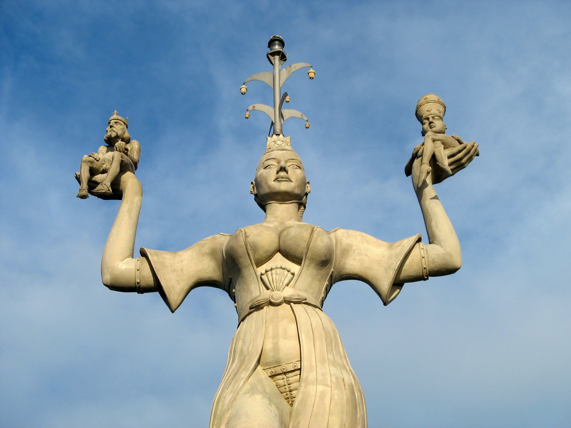 Imperia im Konstanzer Hafen